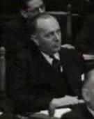 Guus Albregts in 1951